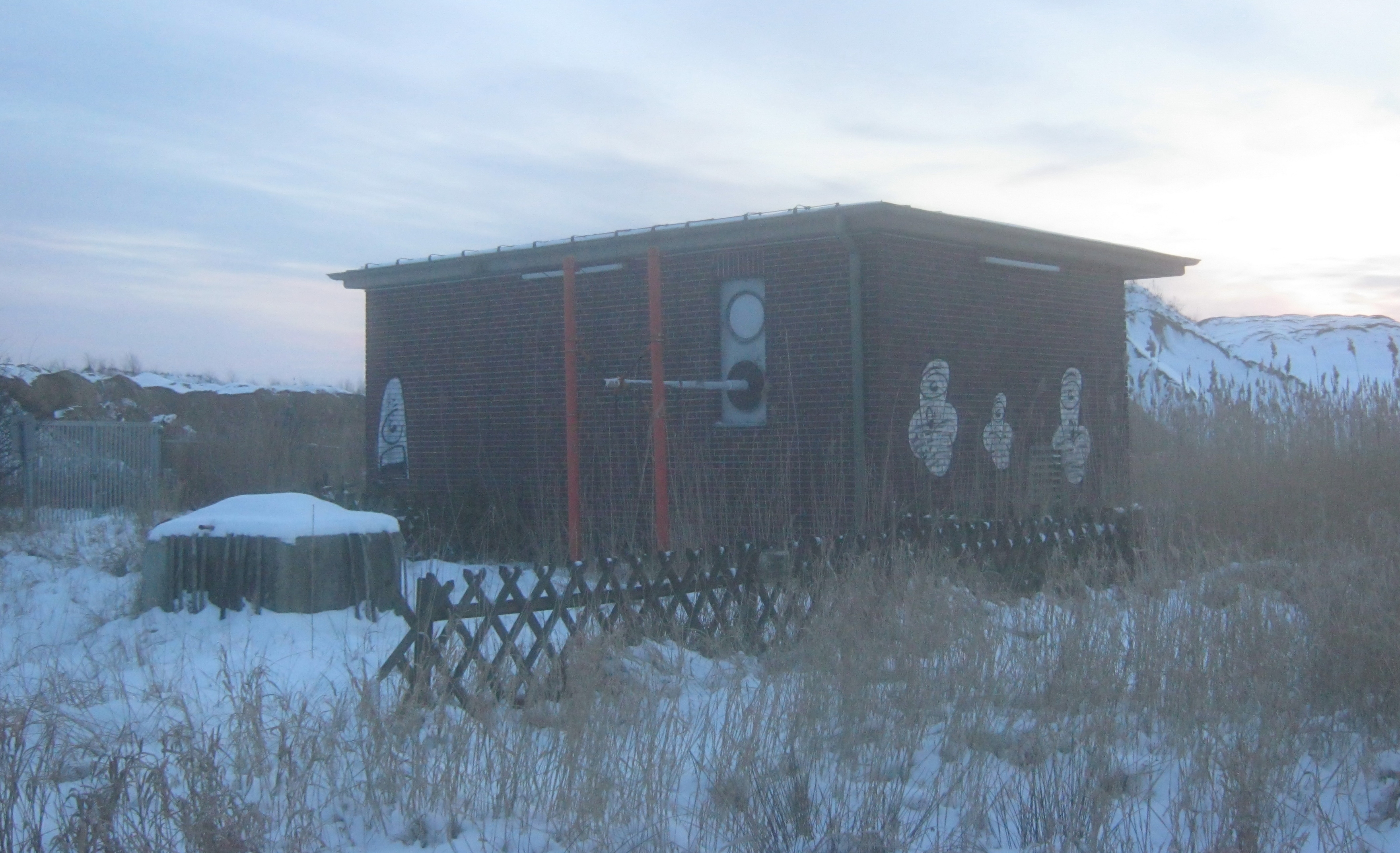 Fundament des einstigen Mittelwellensendemastes des Senders Billwerder-Moorfleet